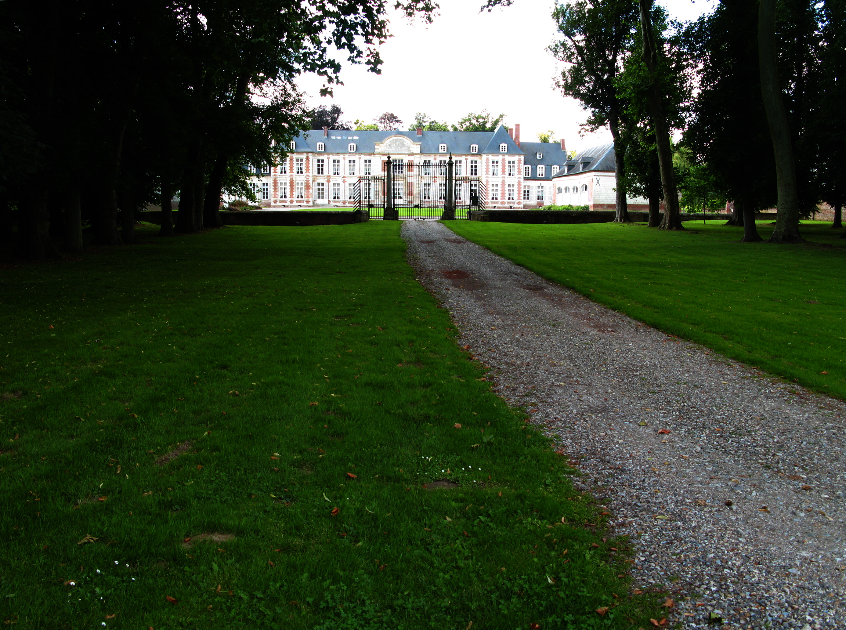 Pissy (Somme, France) - La château est à la sortie du village, en allant vers Revelles. .